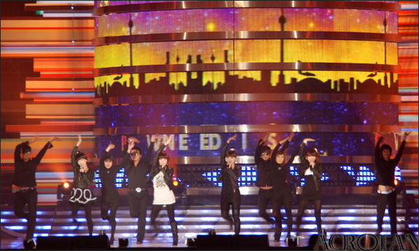 농심 협찬 제9회 '2008 사랑나눔콘서트'